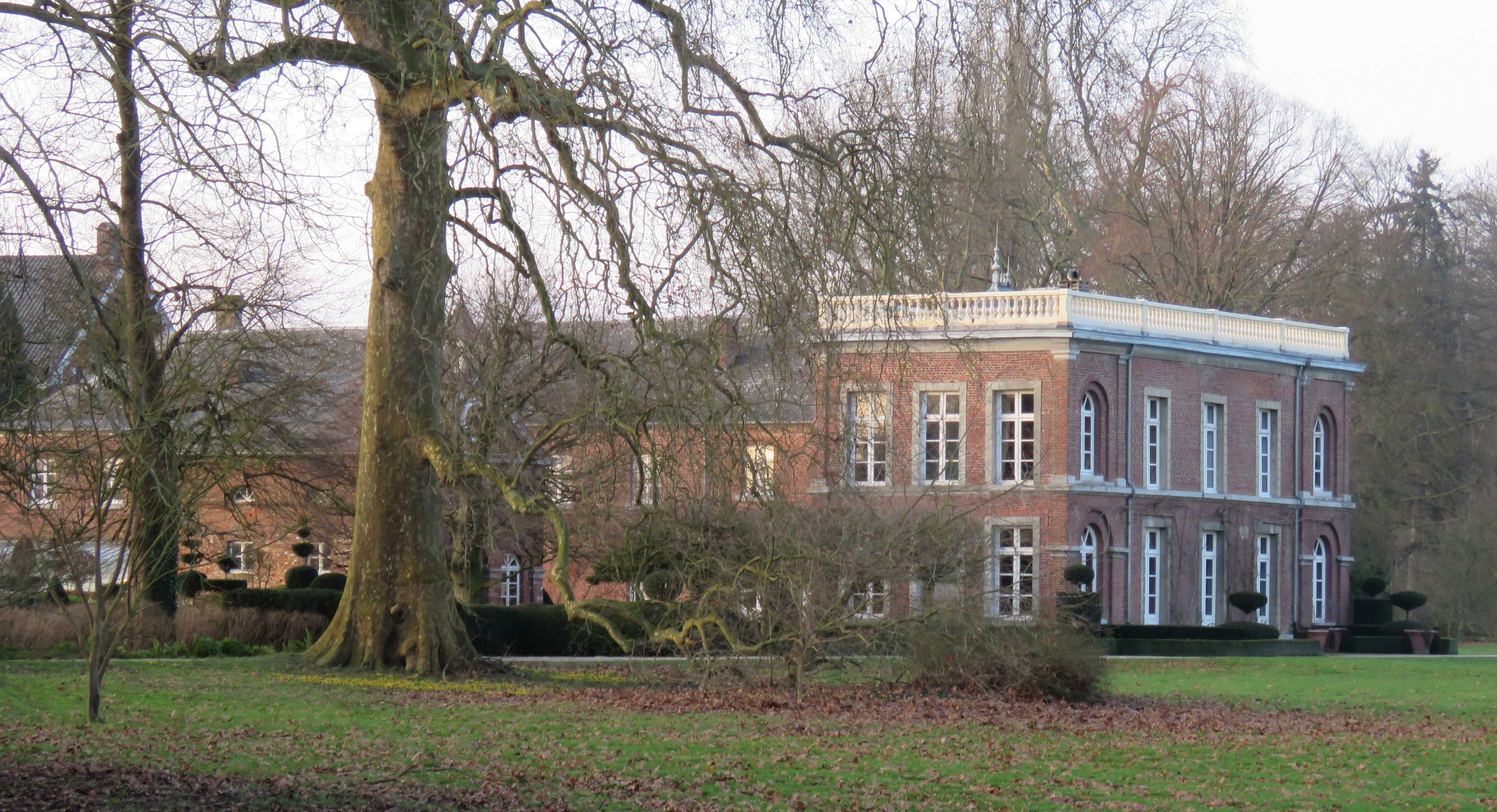 Kasteel de Tornaco in Voort (Borgloon)